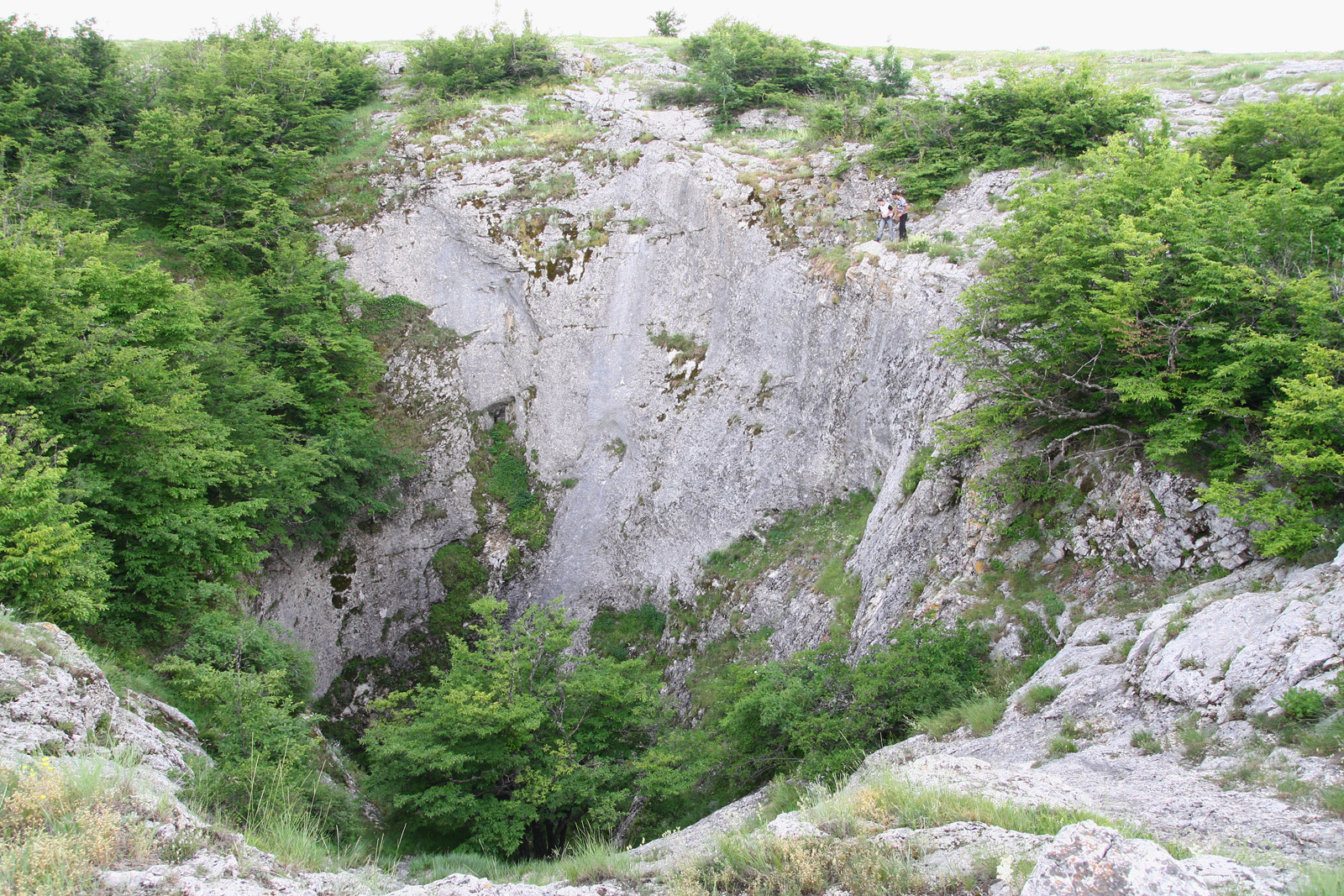 Бездонный колодец (Топсюс-Хосар) вид с северной стороны